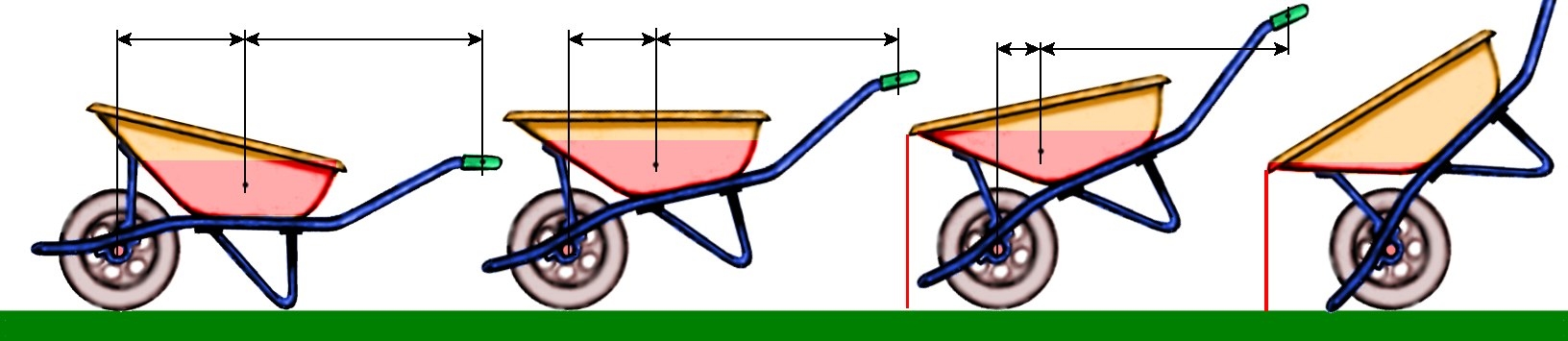 Mem-desegnita bildo. ssire